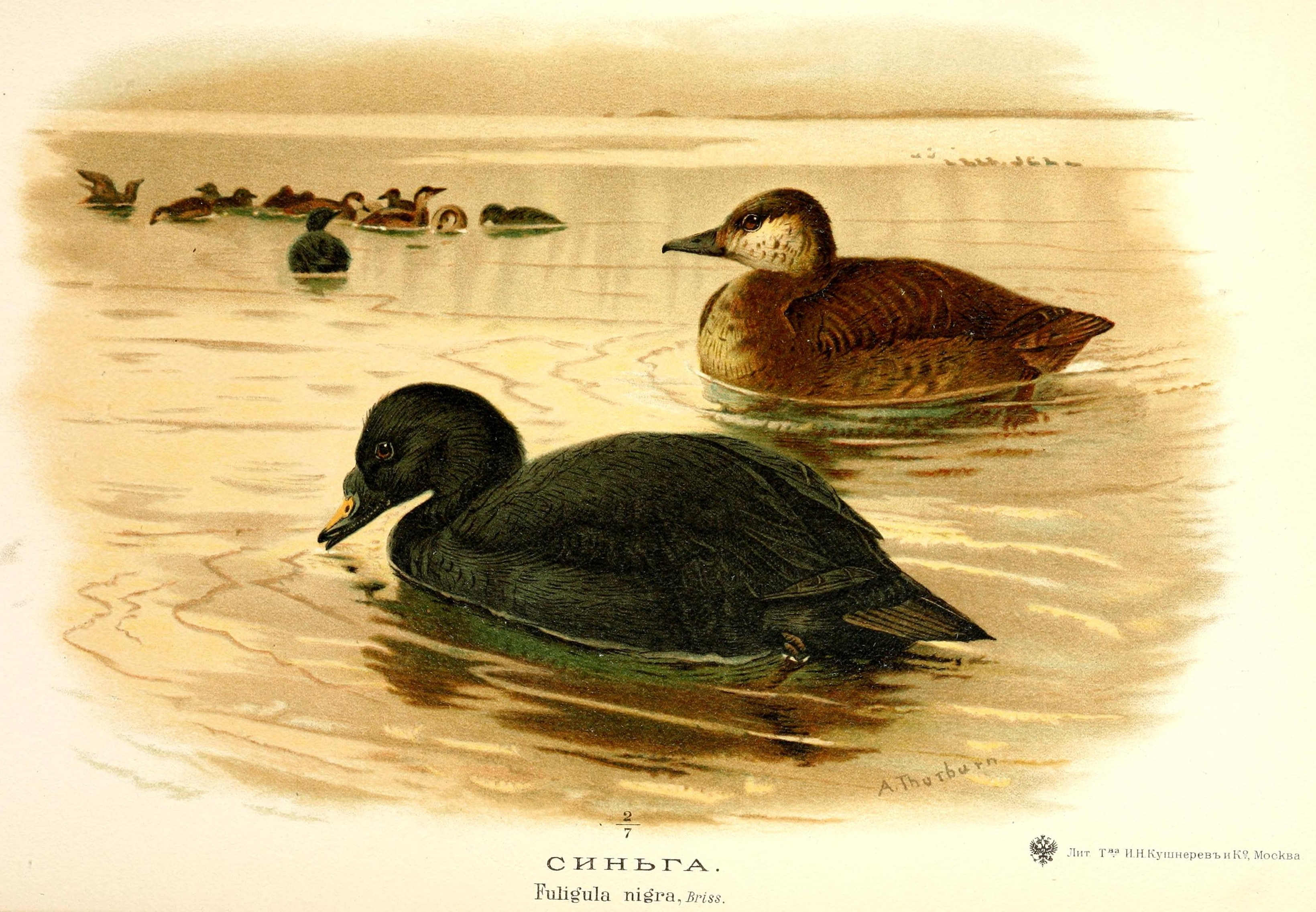 Melanitta nigra